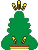 Escudo de Zacatepec, Morelos.